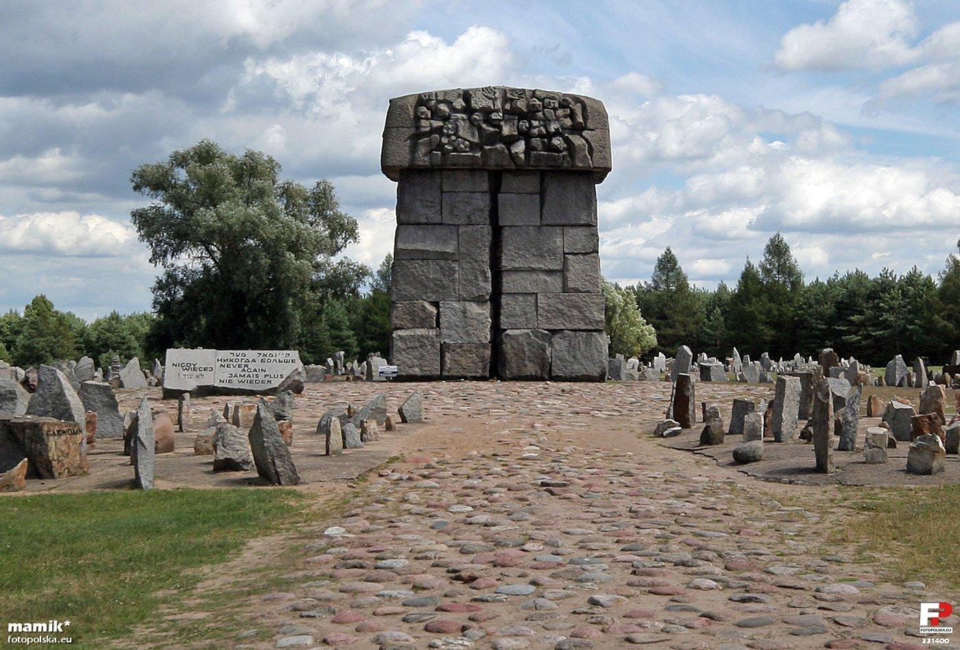 Pomnik autorstwa Franciszka Duszeńki, zbudowany z dużych bloków granitowych, nawiązujących do Ściany Płaczu w Jerozolimie